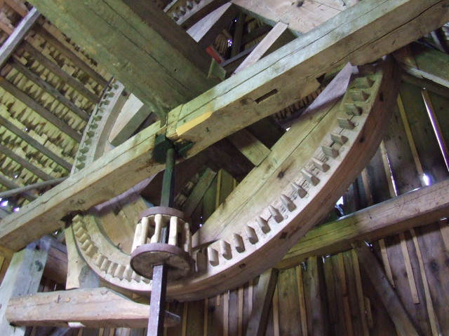 open air museum in Bialowieza, Poland; skansen w Białowieży